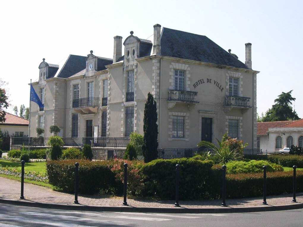 Maison habitée par Jean Hameau de 1824 à 1844. Ancienne mairie de La Teste-de-Buch.